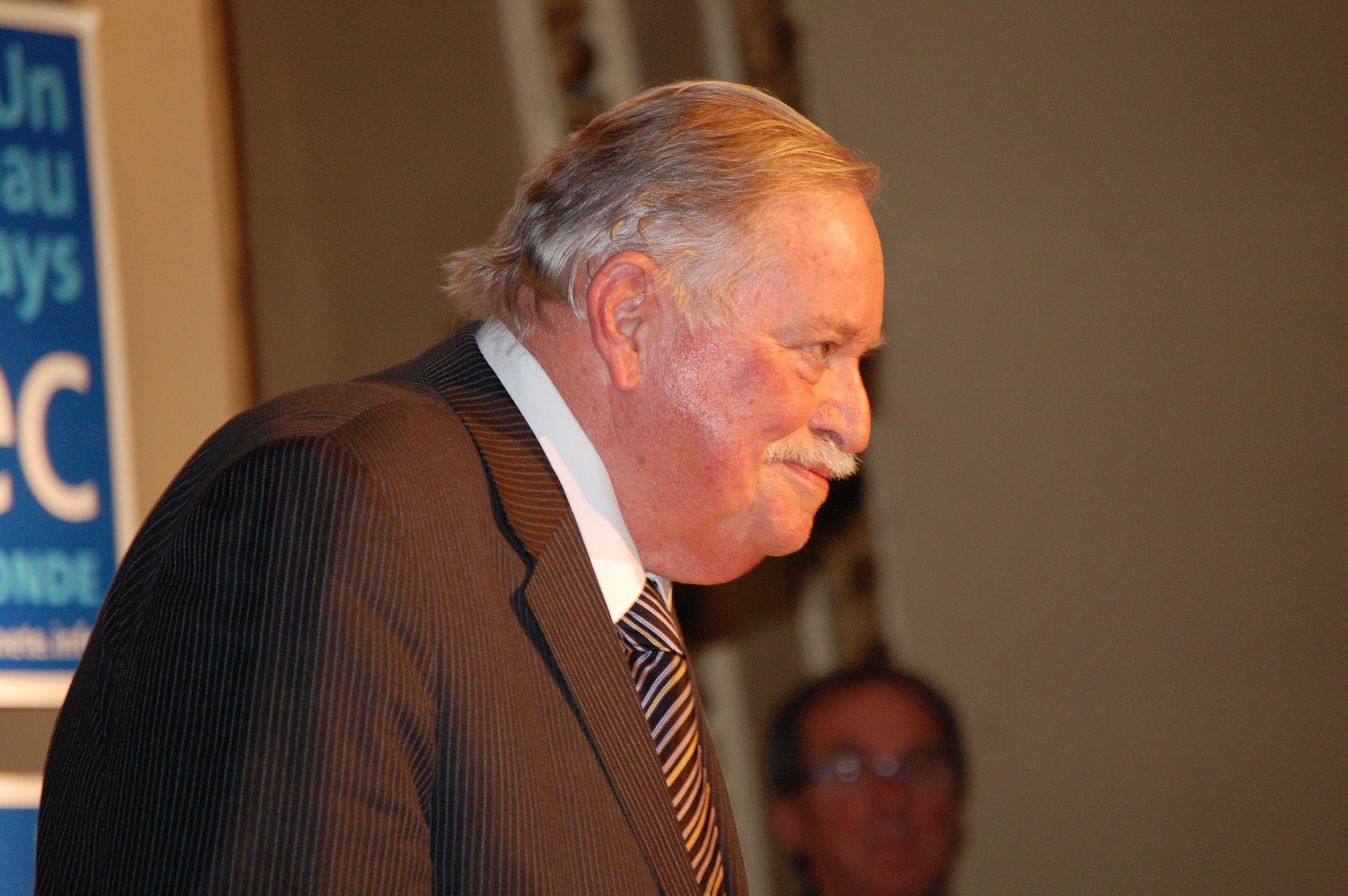 Jacques Parizeau lors d'une conférence à Nicolet